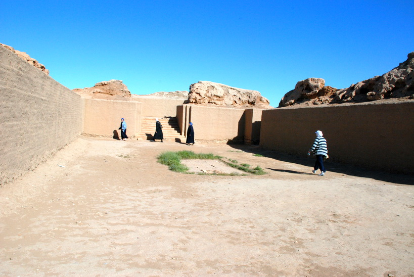 احدى غرف القصر